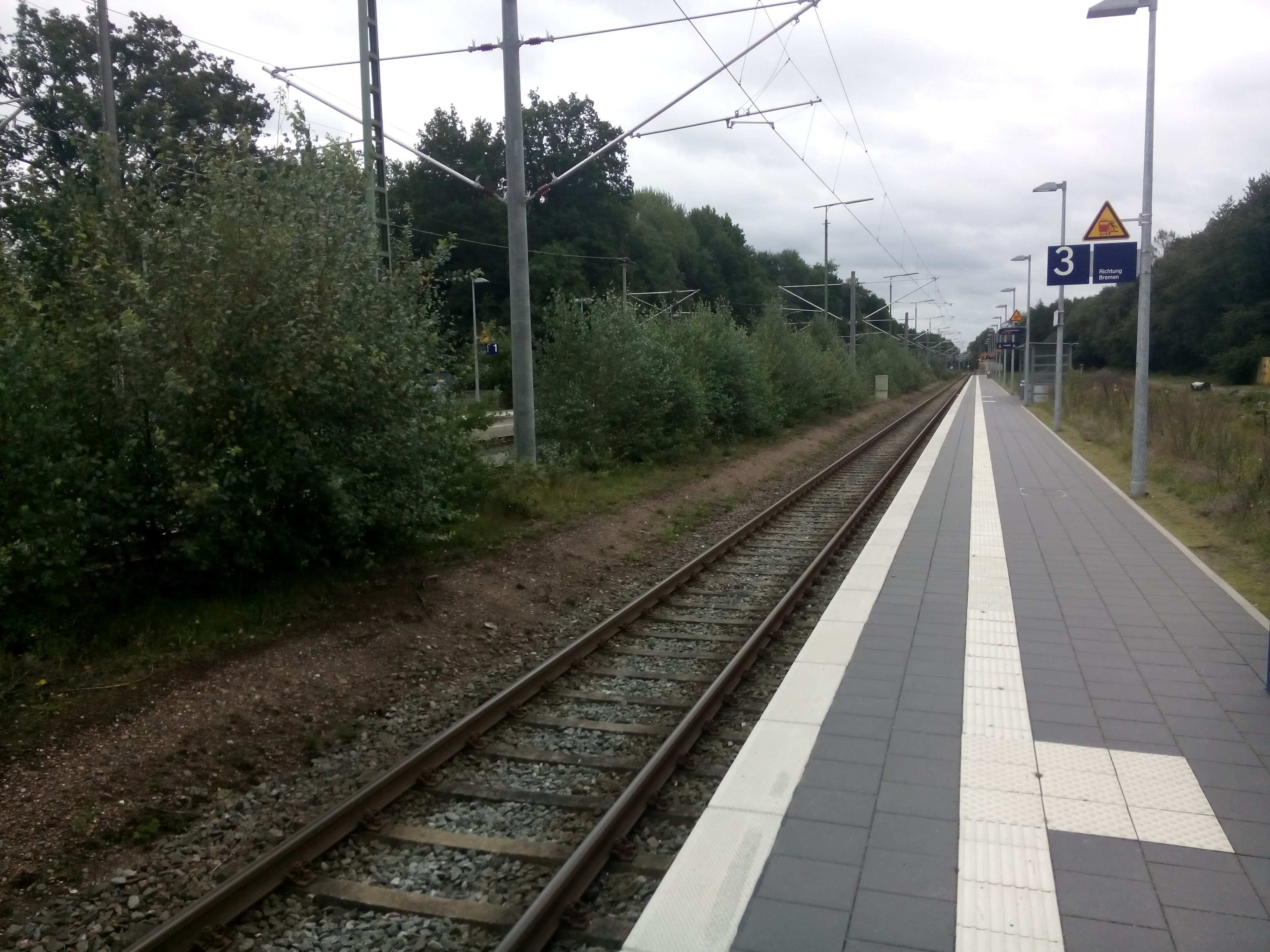 Gleis 3 (Richtung Bremen) am Bahnhof Lübberstedt